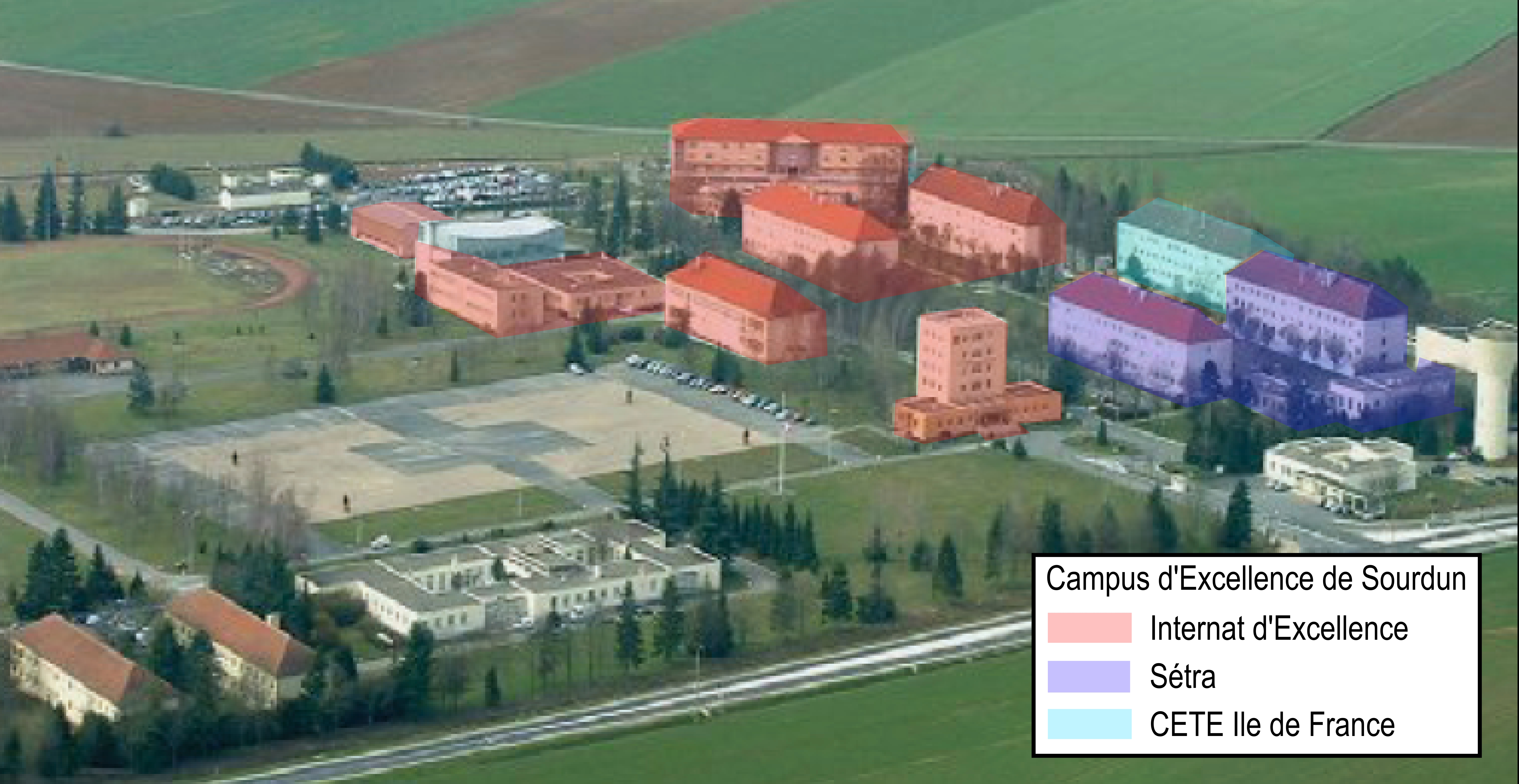 Vue du site du Campus d'Excellence de Sourdun en 2010 (Seine et Marne, région Île-de-France).